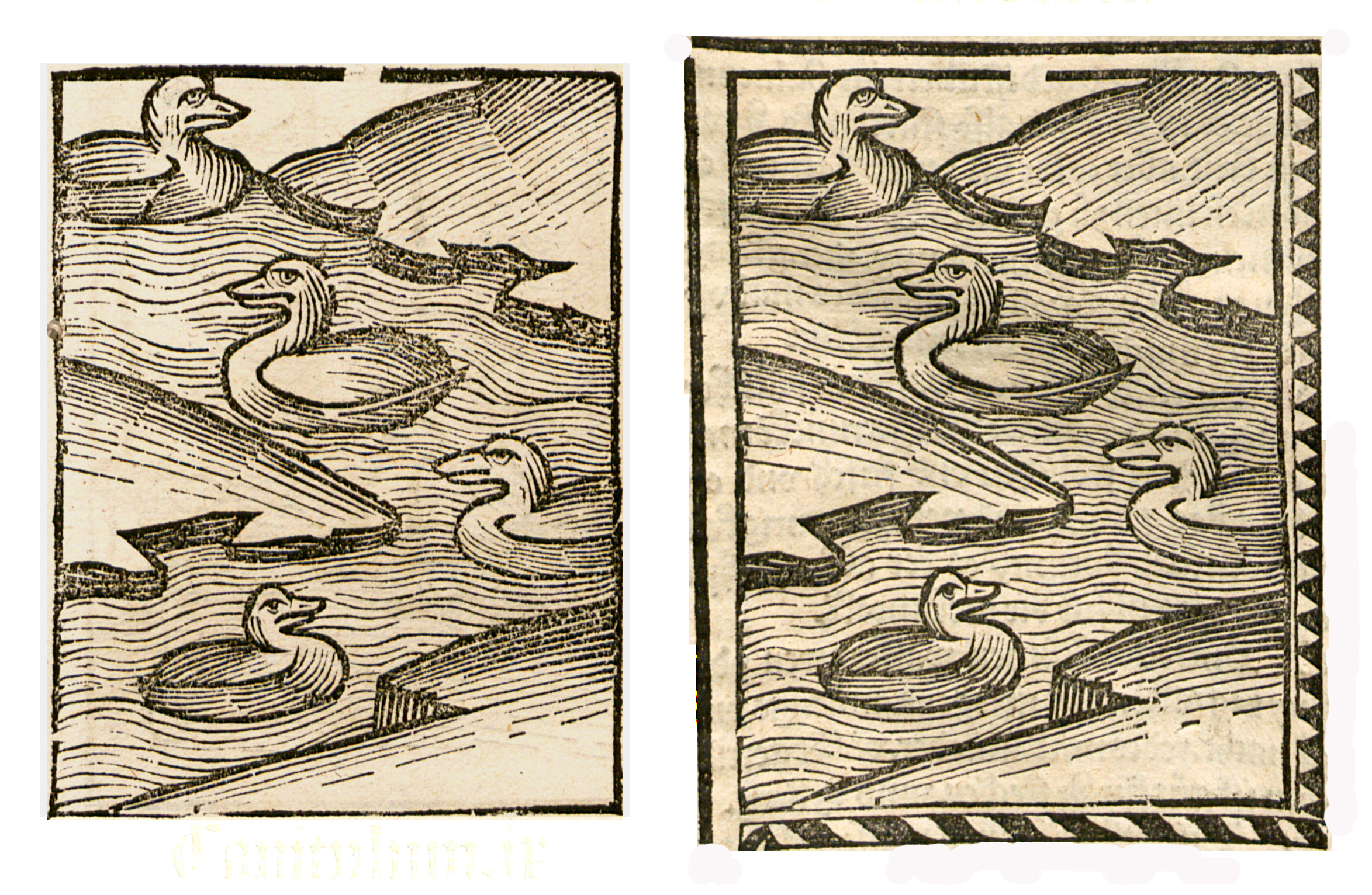 Abbildung von: Enten